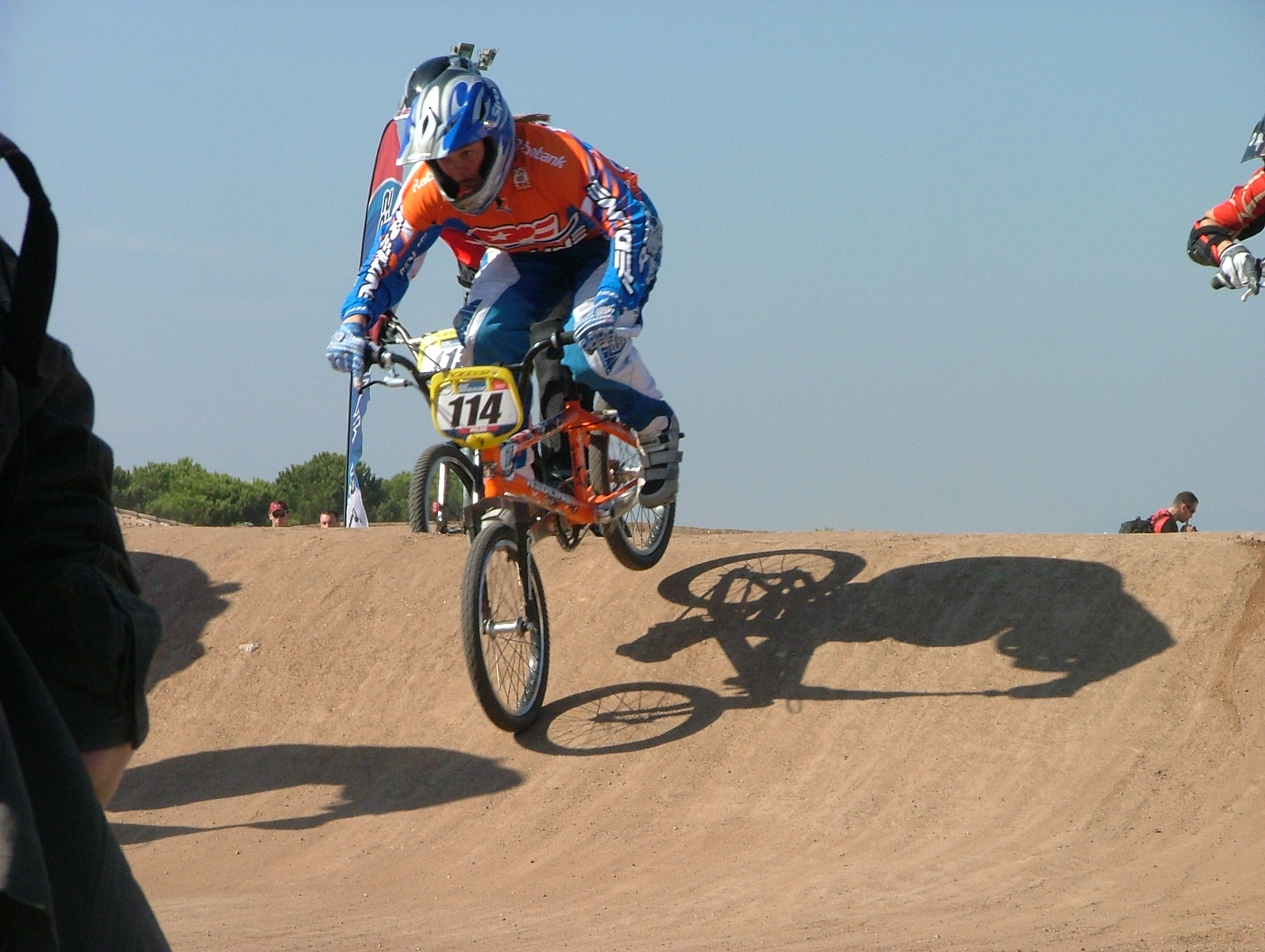 114 Lieke Klaus (Nederland)